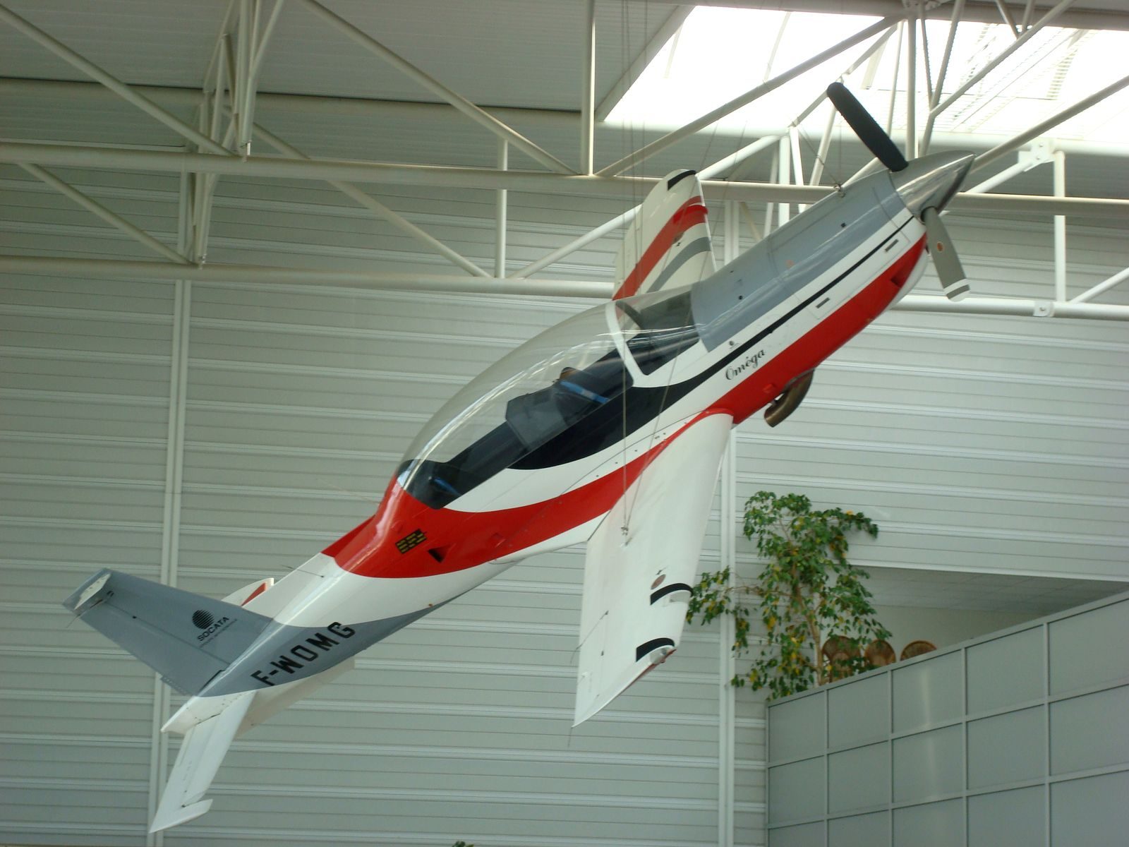 Prototipo dell'aereo Socata TB-31 Oméga nell'aeroporto di Tarbes-Lourdes-Pyrénées.